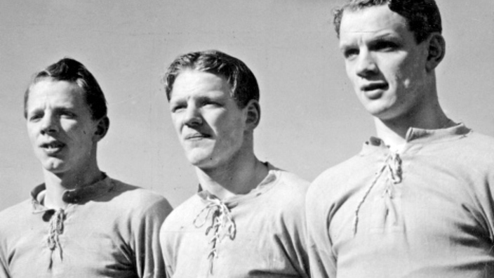 Arne, Kjell och Sven Hjertsson, Malmö FF. Den 29 maj 1940 på Råsunda.